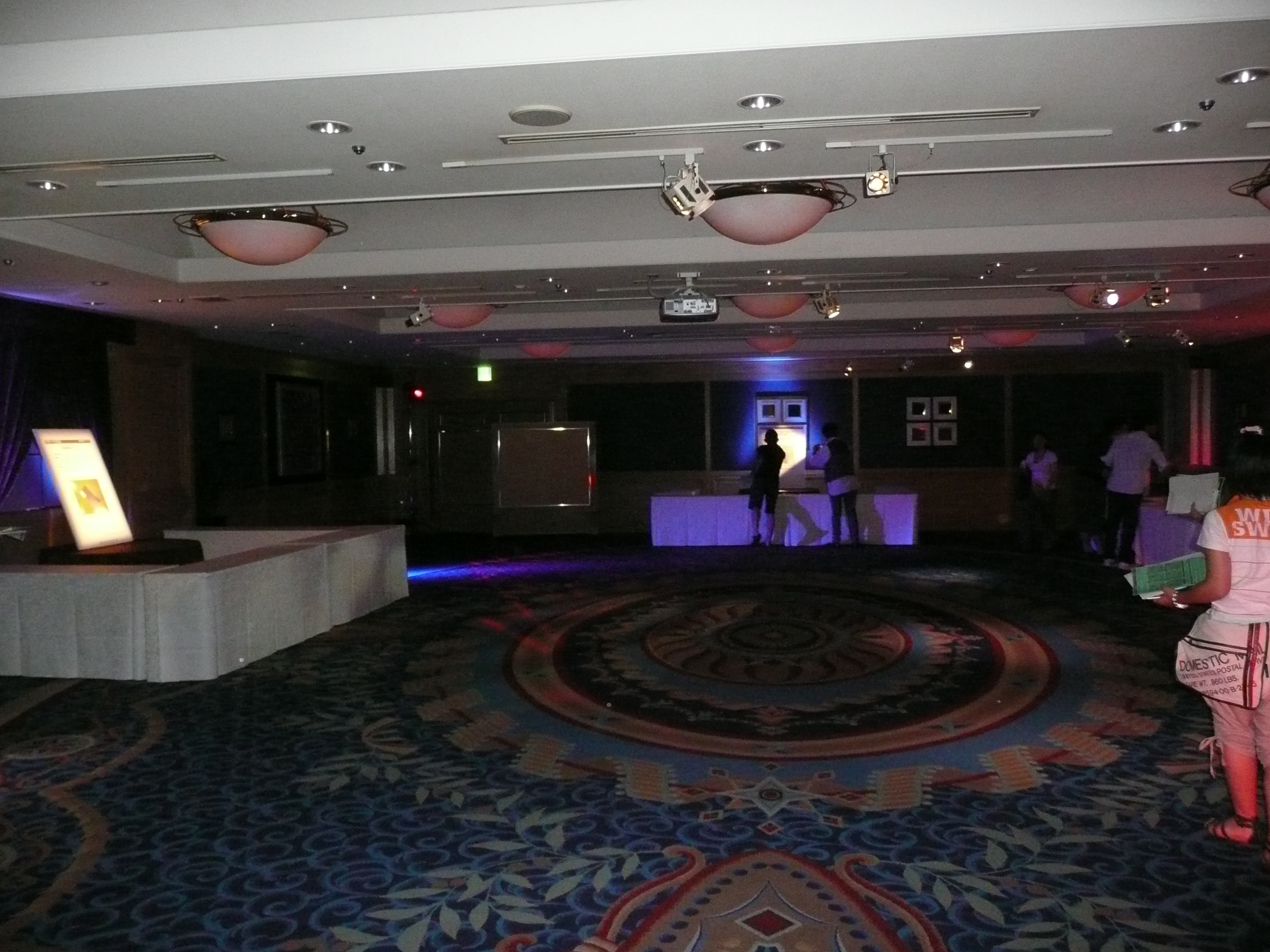 ミステリーナイト ヒントルームの画像